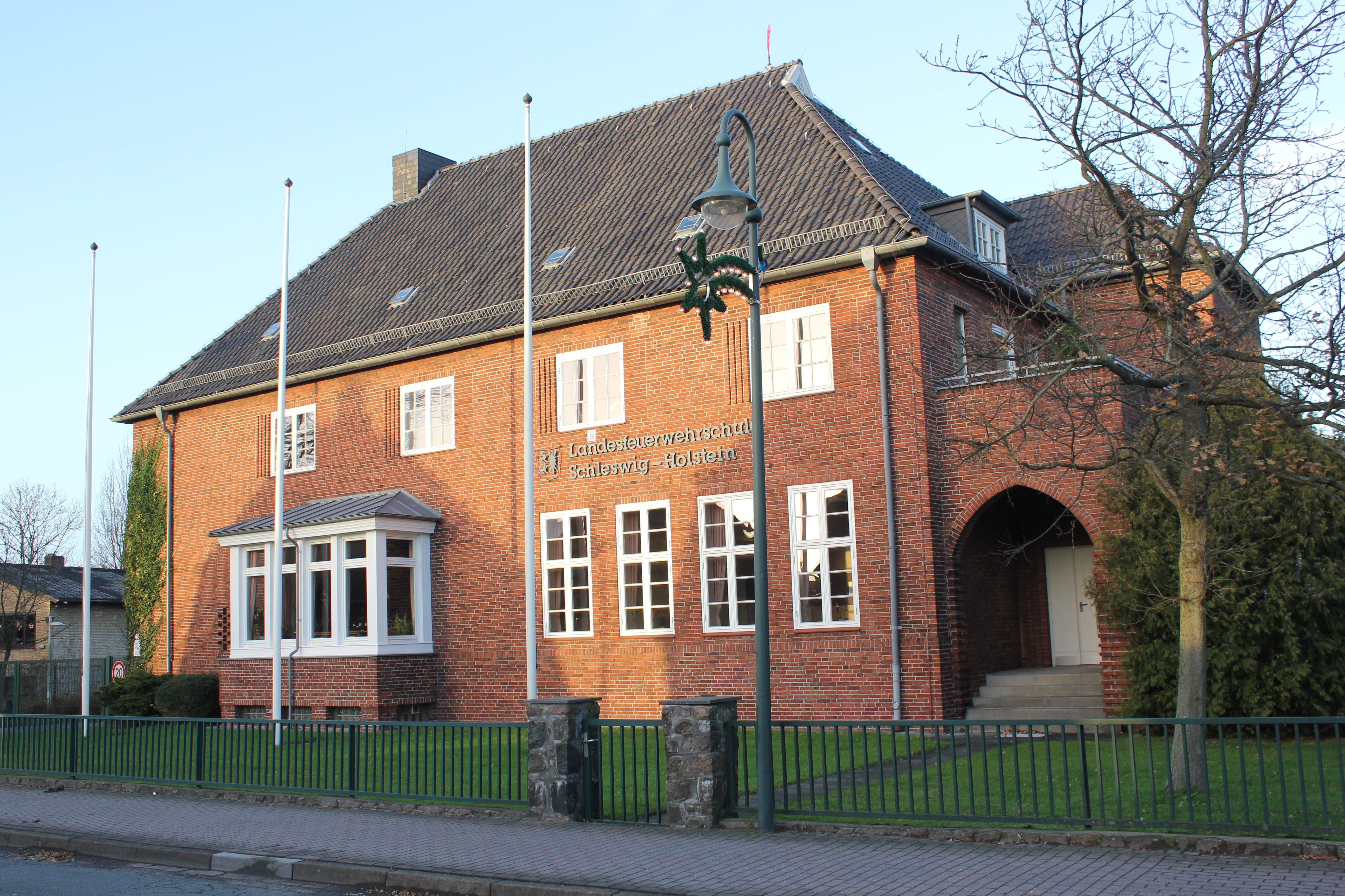 Gebäude der Landesfeuerwehrschule Schleswig-Holstein in Harrislee, Ortsteil Harrisleefeld; erbaut als Arbeitervolkshochschule und 1936 zur Feuerwehrschule umgenutzt